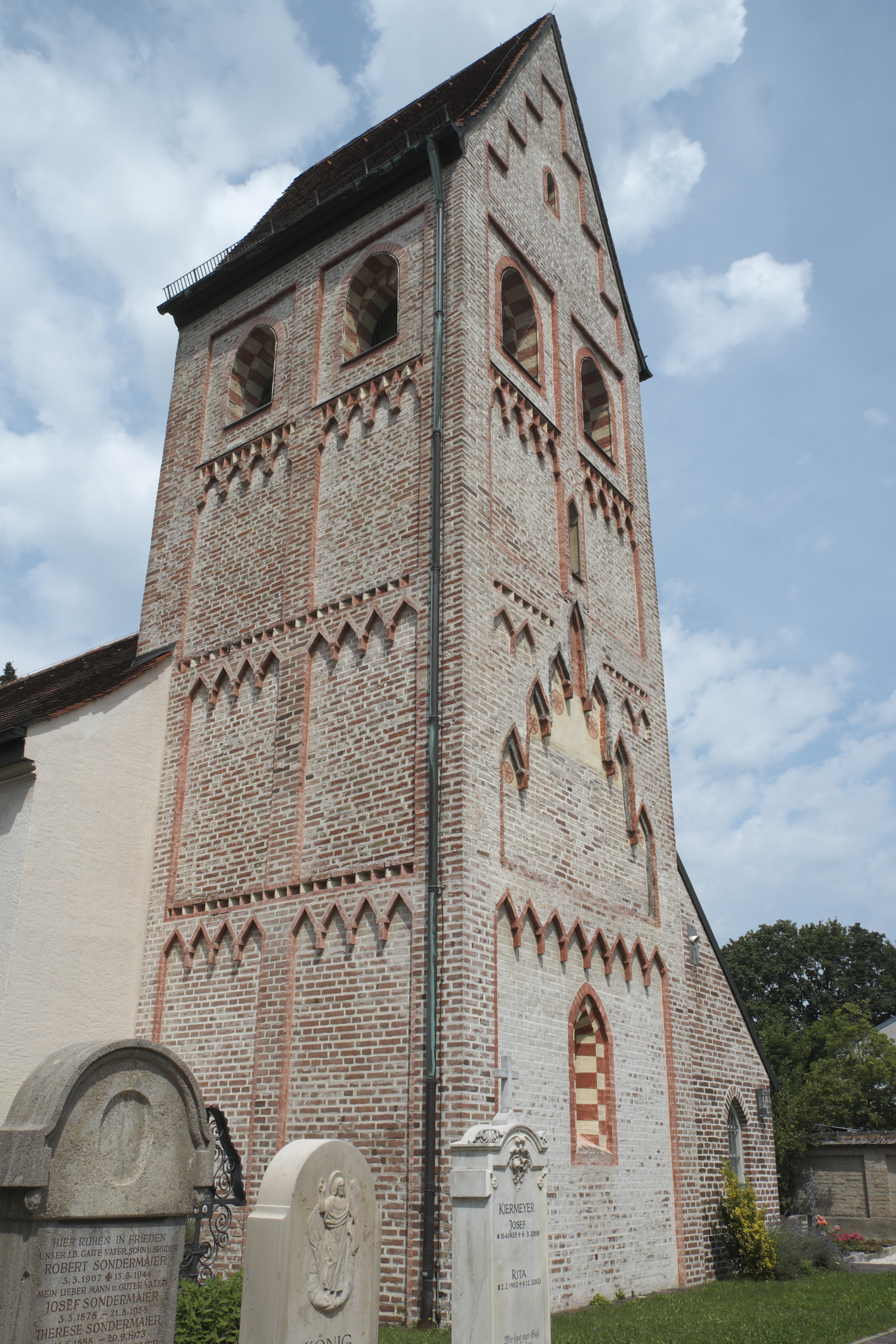 Alte katholische Pfarrkirche, jetzt Filialkirche St. Nikolaus in Freimann im Stadtbezirk Schwabing-Freimann in München (Bayern/Deutschland), Turm